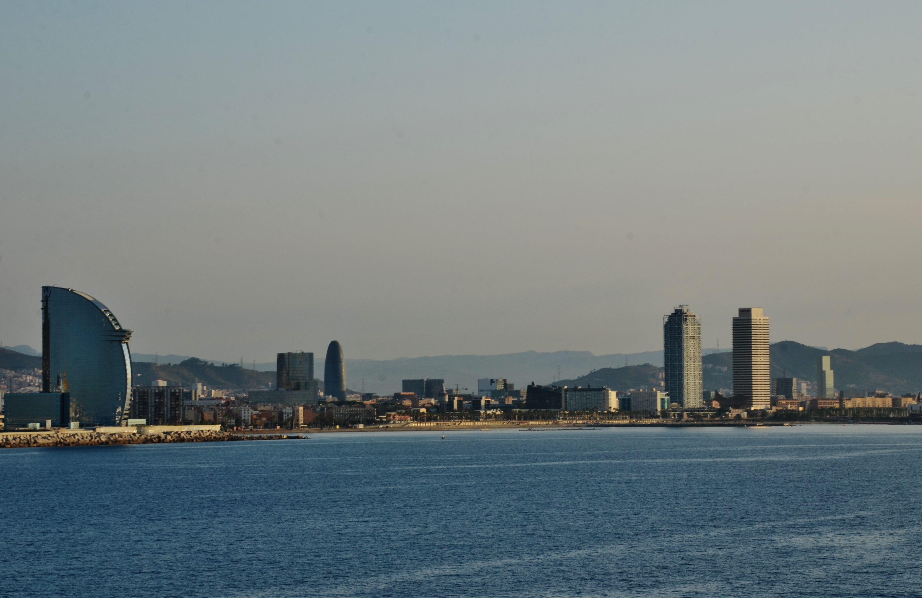 Platja de la Barceloneta (Barcelona) This is a a photo of a beach in Catalonia, Spain, with id: PL-CT-17003-50